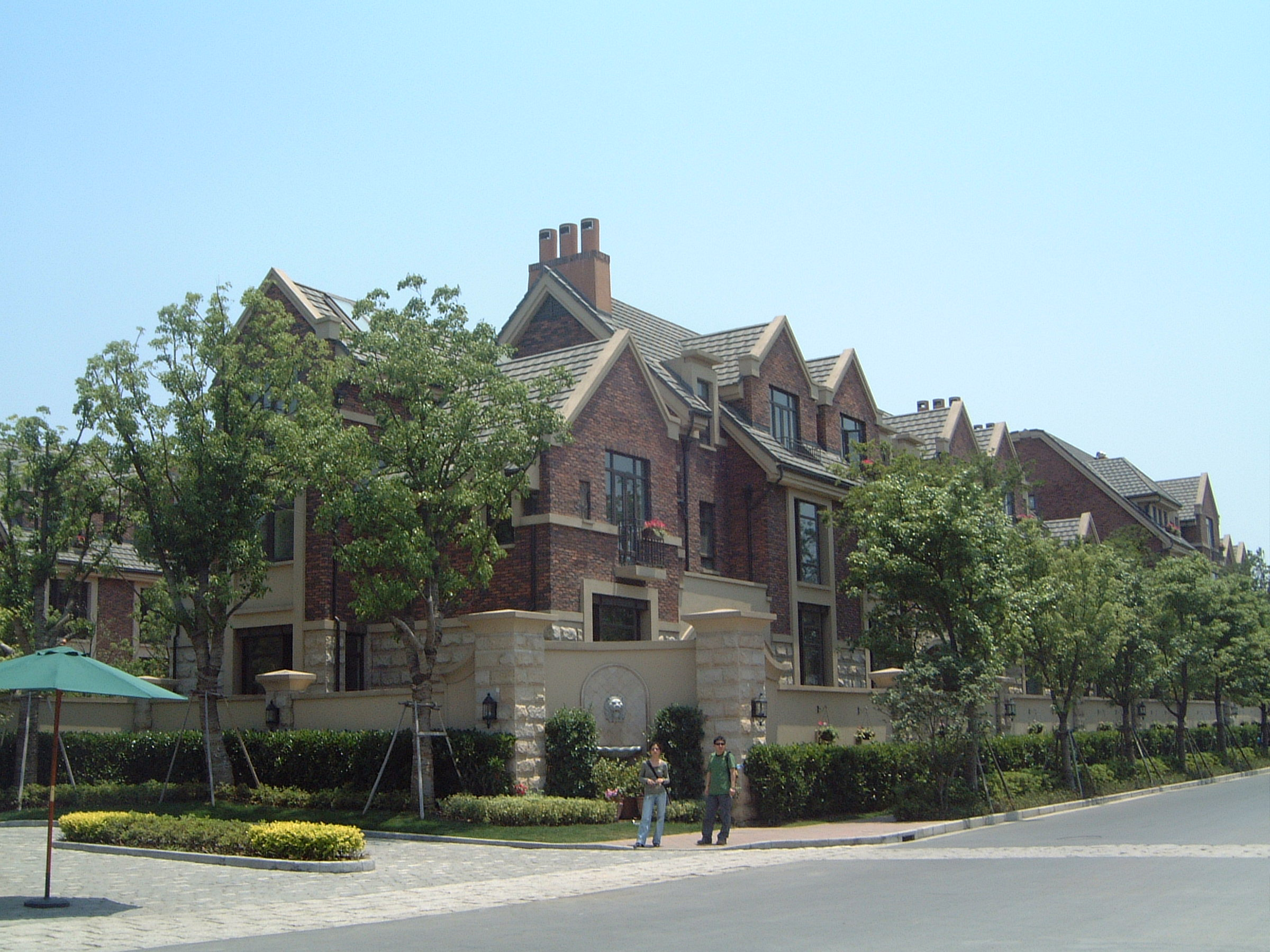 Vanke - Stratford (Red Shire) 万科红郡 诸新路388弄，诸新路377弄